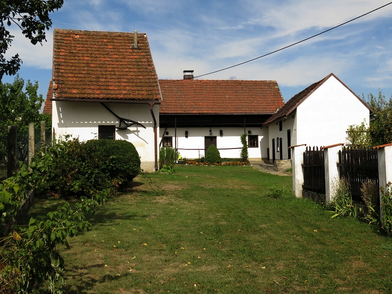 Usedlost čp. 5, Přetín 5, Přetín.